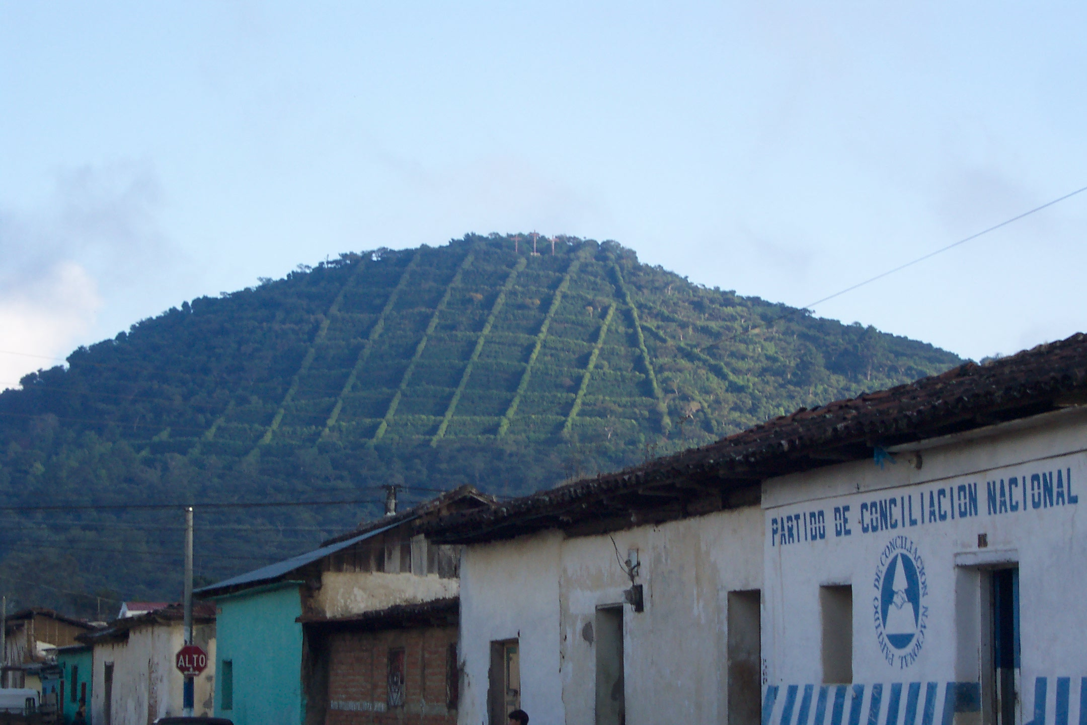 Colina de Apaneca, El Salvador